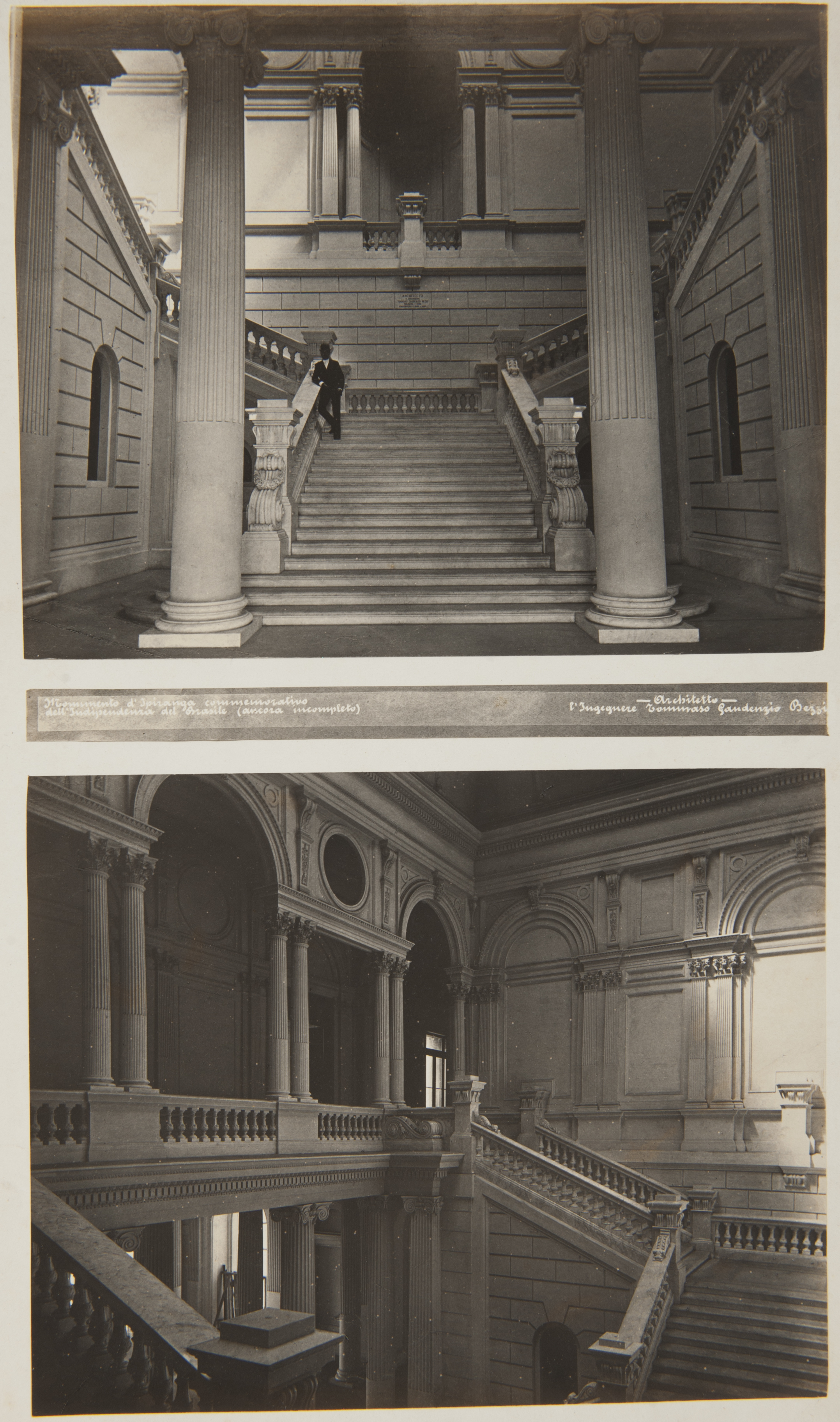 Obra que integra o acervo do Museu Paulista da USP.